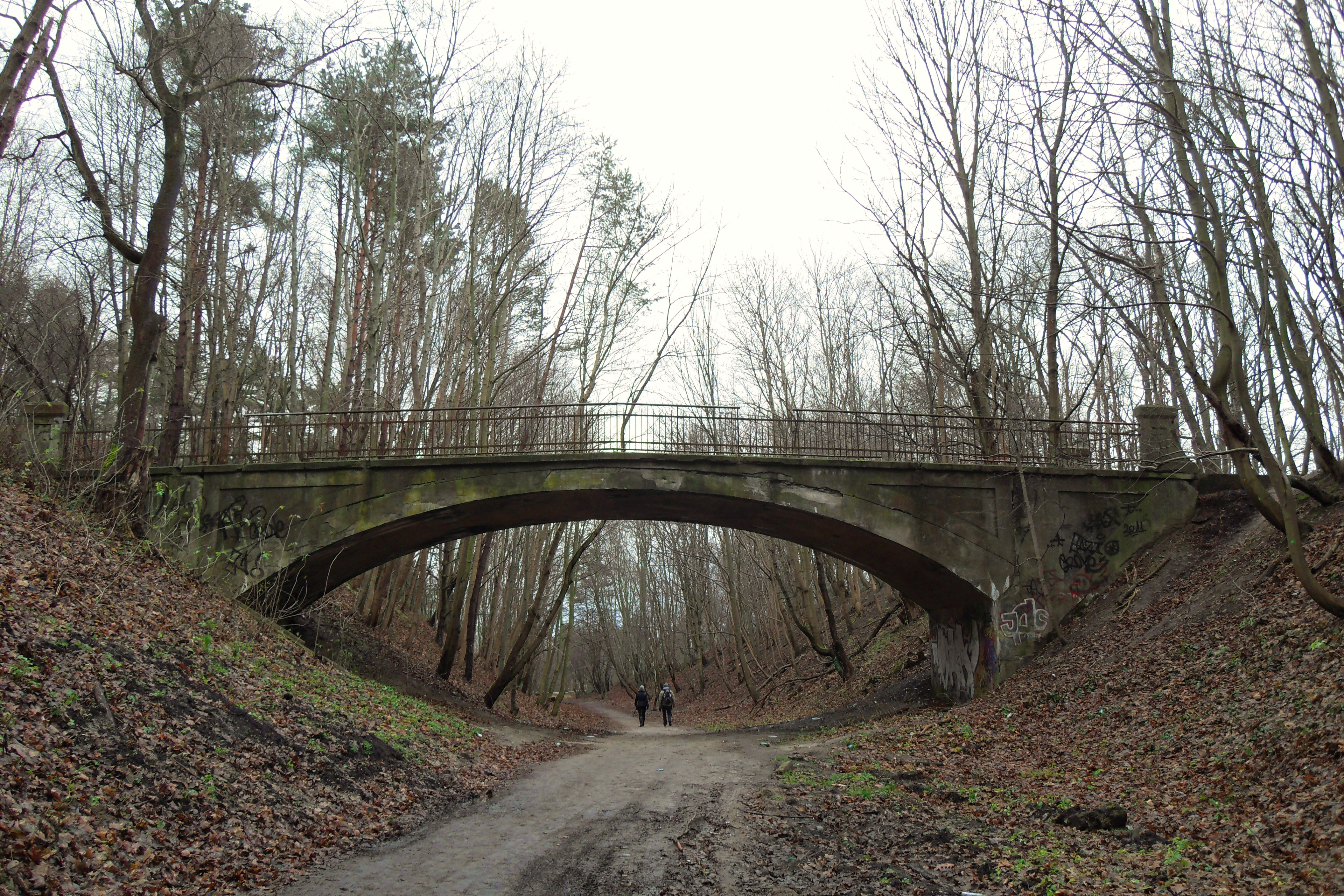 Gdańsk Strzyża, nieistniejący ok. 100-letni wiadukt nad dawną linią kolejową (strona południowa).